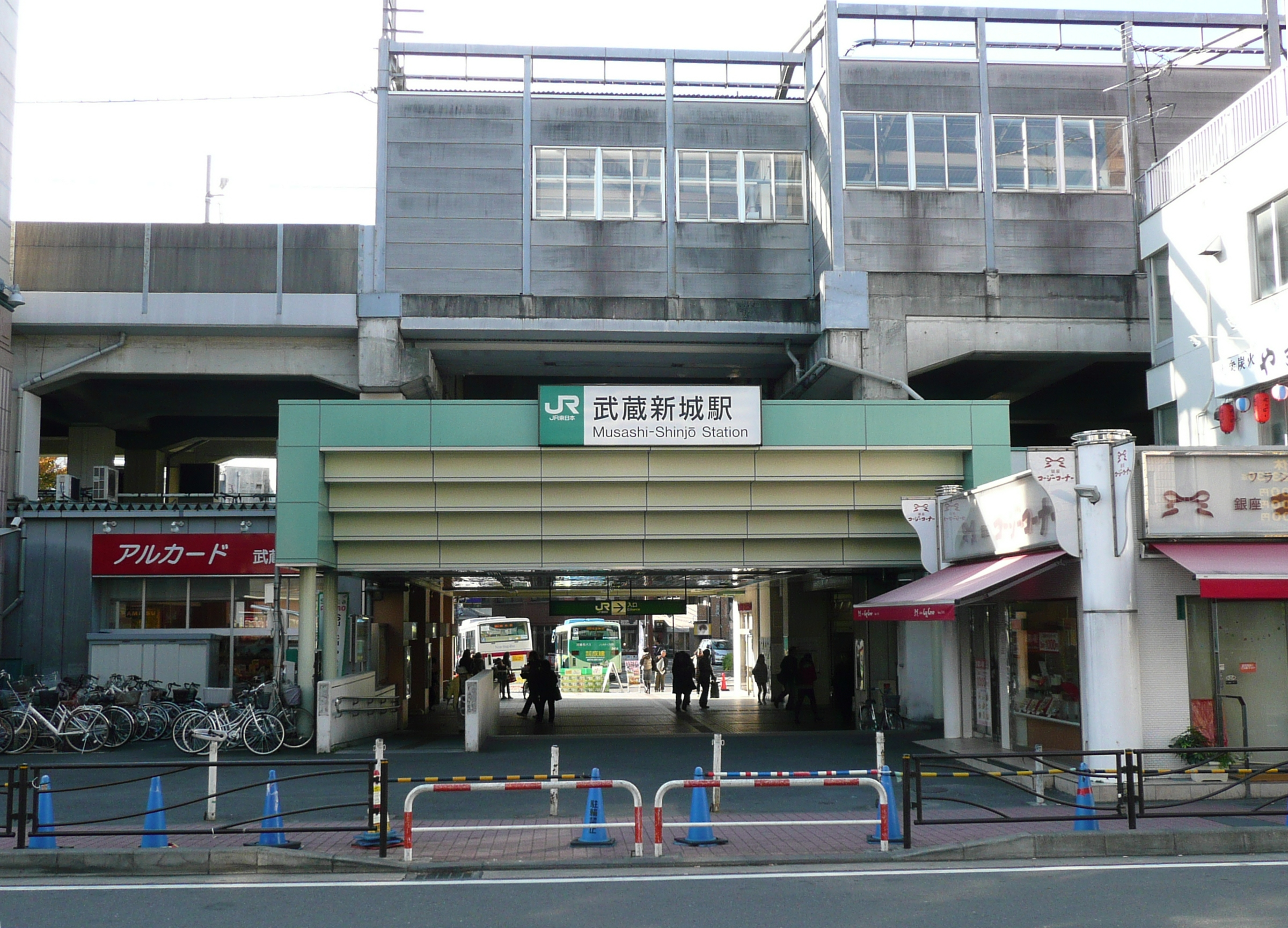 武蔵新城駅北口